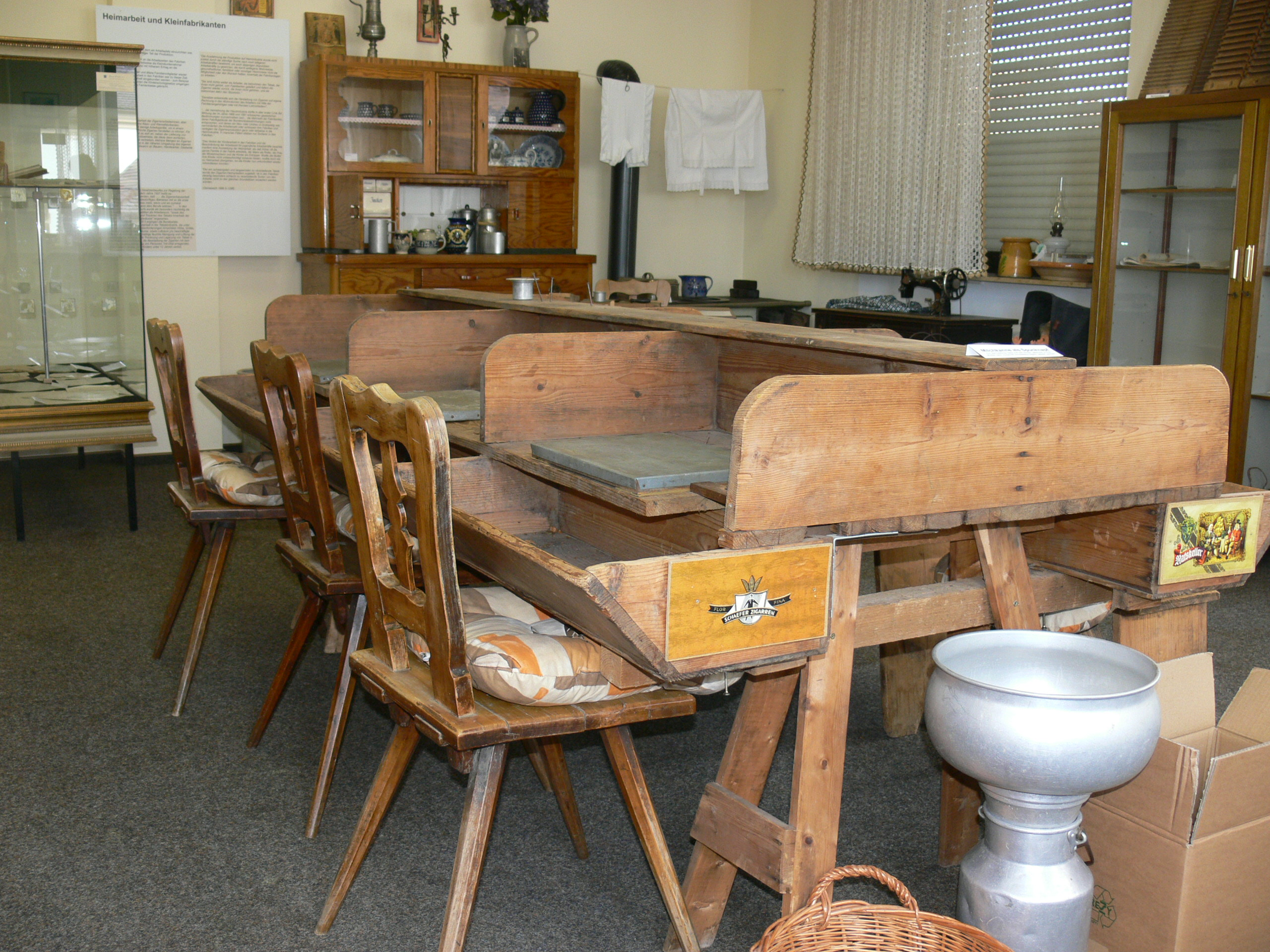 Ausstellung Museum Rödersheim-Gronau, Abteilung Herstellung Zigarren